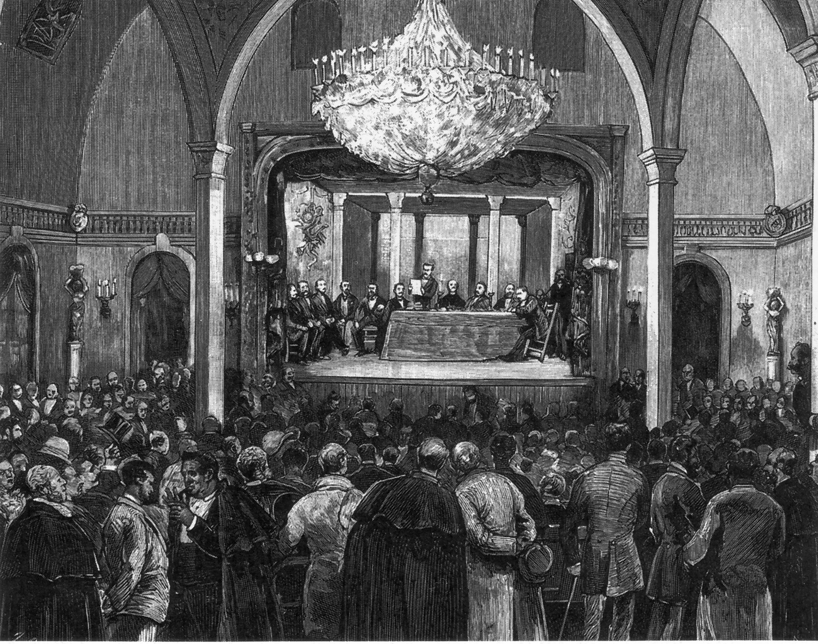 Grabado-ilustración de Comba de un mitin en el Teatro de Capellanes (Madrid)